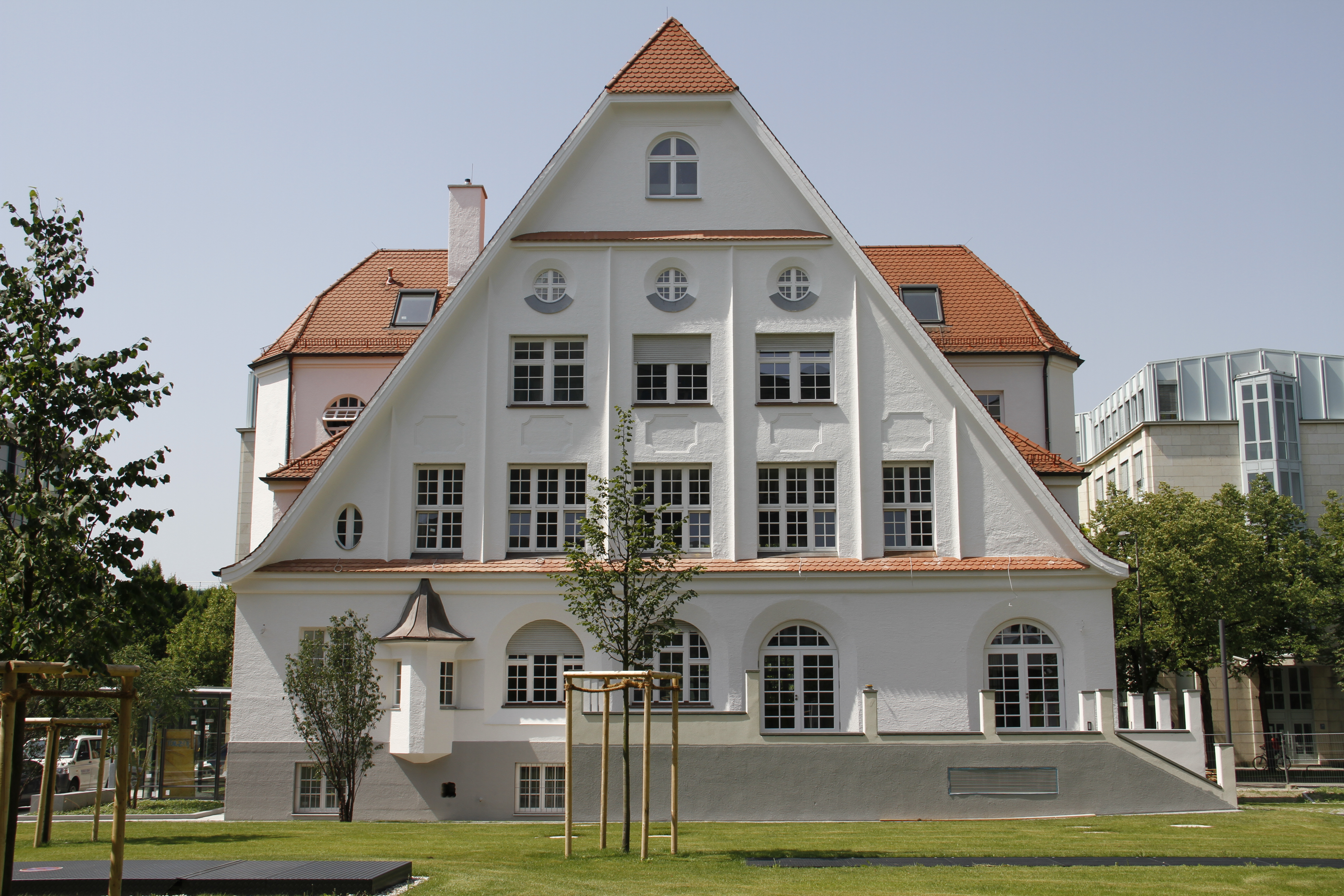 Hansastraße 21, München - ursprünglich Kontorhaus, heute Tagungshaus des ADAC